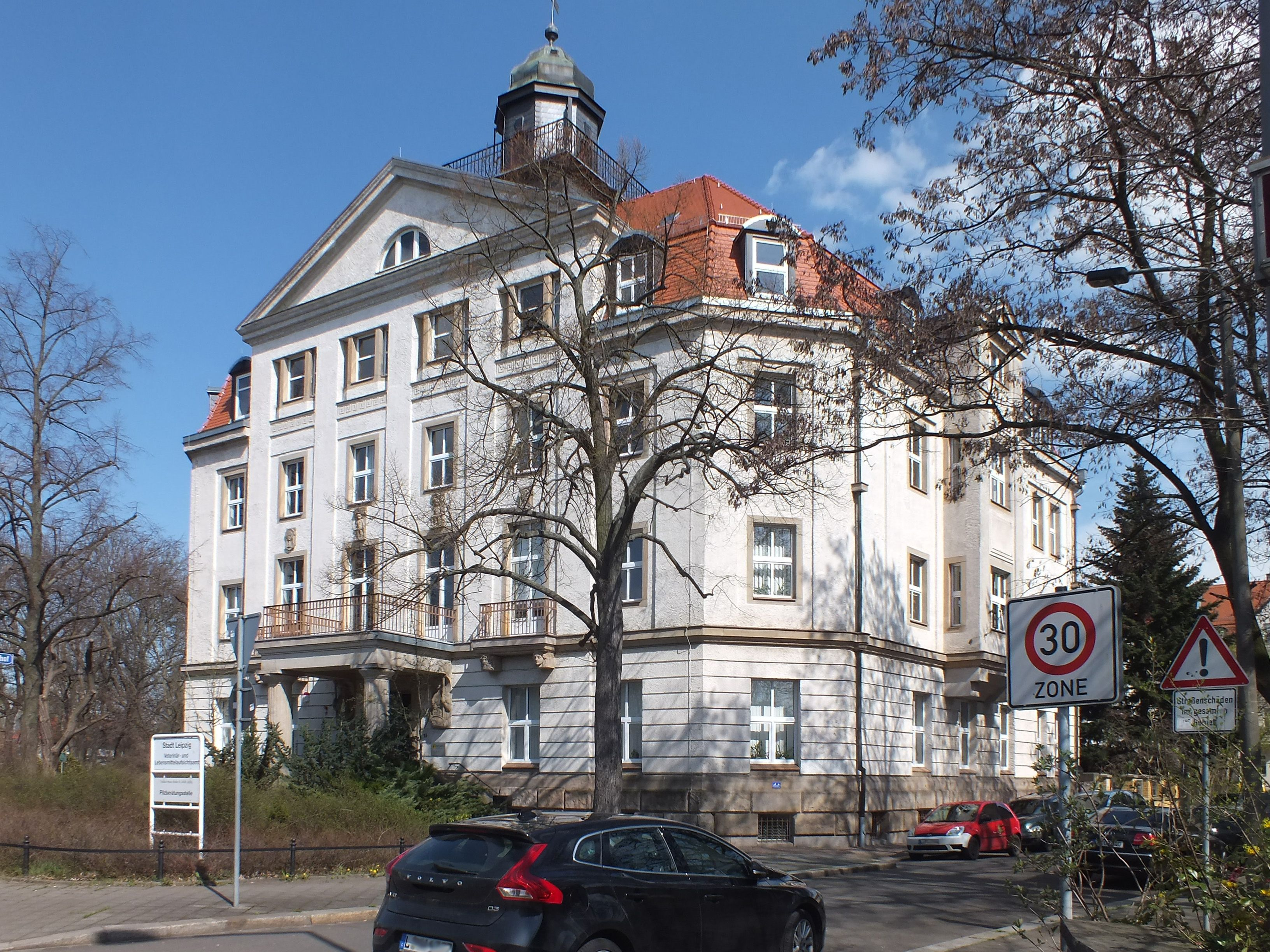 Das ehemalige Rathaus in Leipzig-Paunsdorf